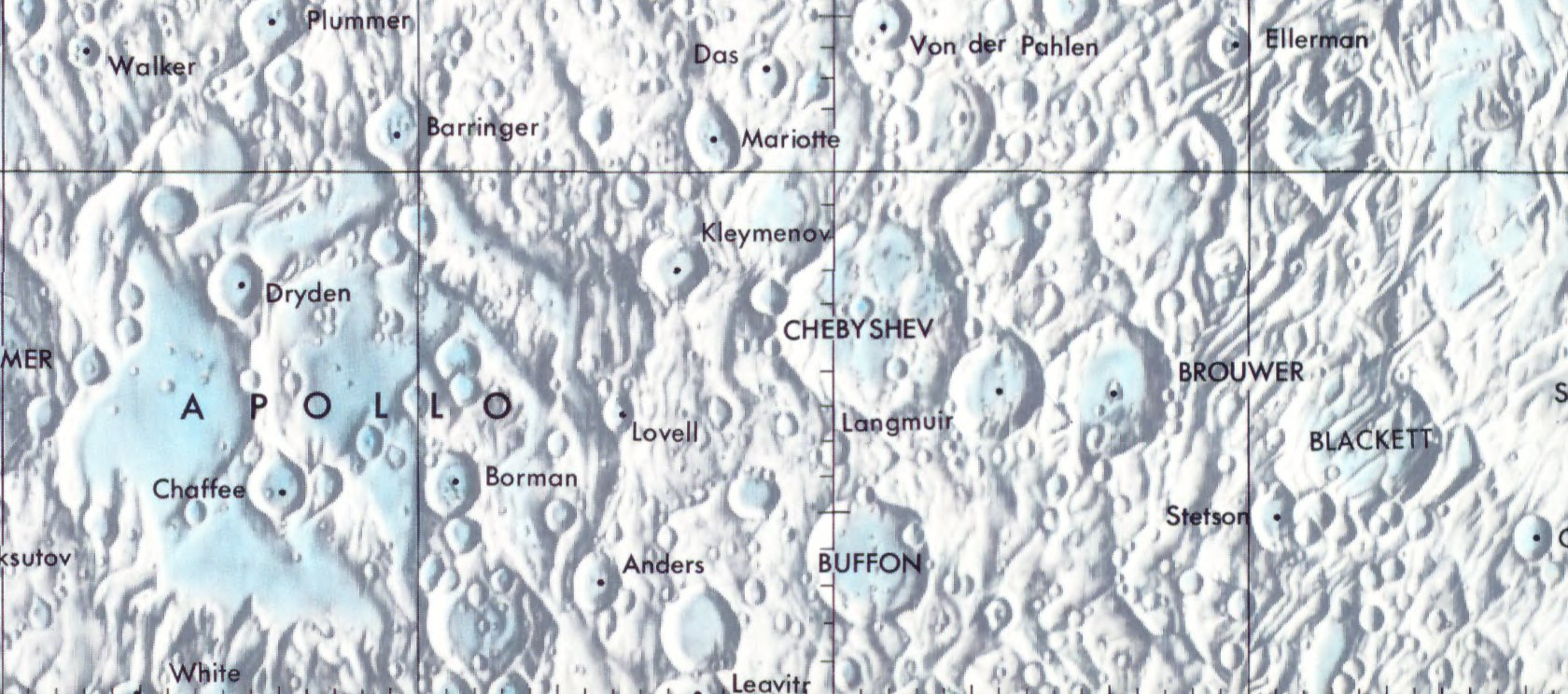 Cráter lunar Chebyshev. Localización. (Lunar Chart LPC1. Second Edition)